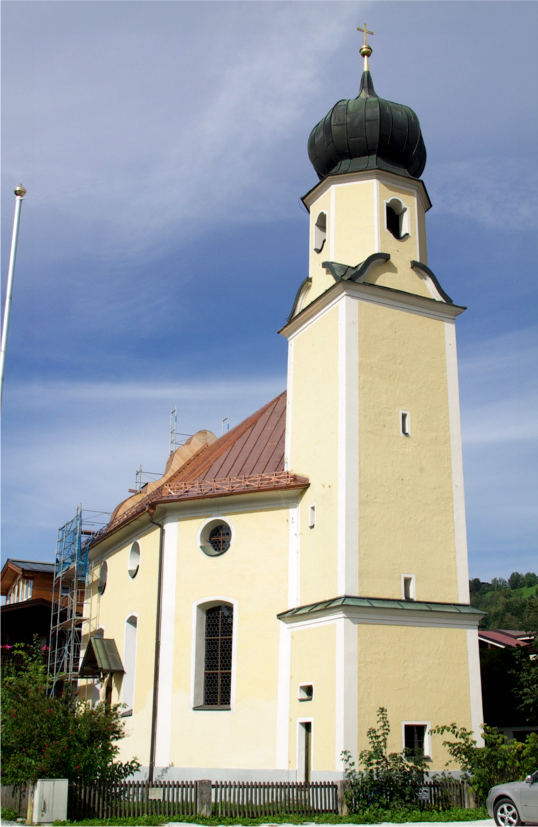 Annakirche und Friedhof